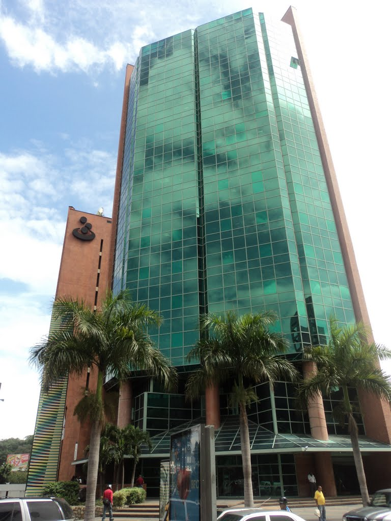 Torre Banesco, sector El Rosal, Caracas, Venezuela